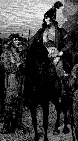 Dobelnsoldier